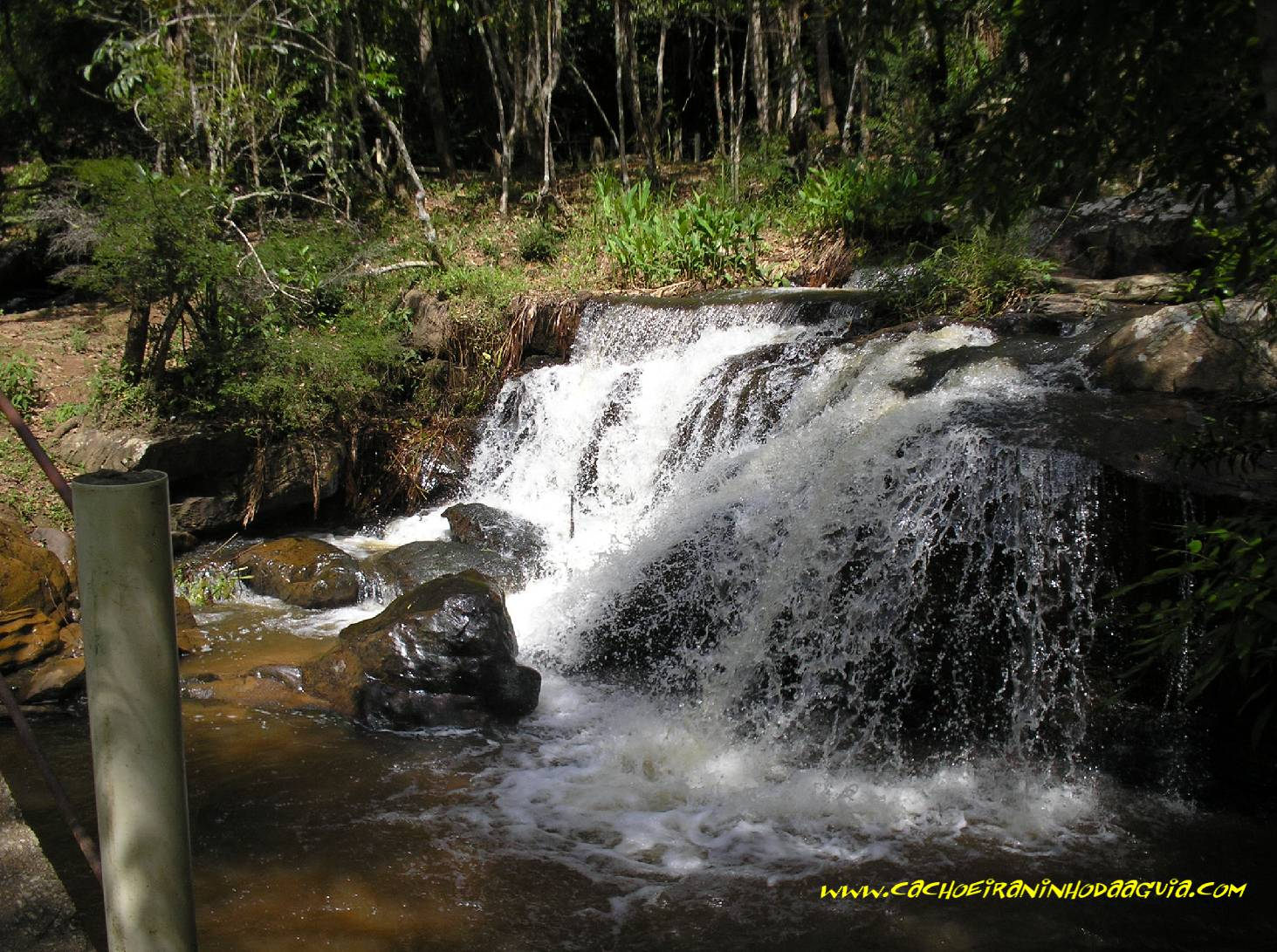 Ducha Natural formada por uma das quedas do Rio Santo Antônio, dentro do Clube de Campo Cachoeira Ninho da Águia, Delfim Moreira Sul de Minas gerais.